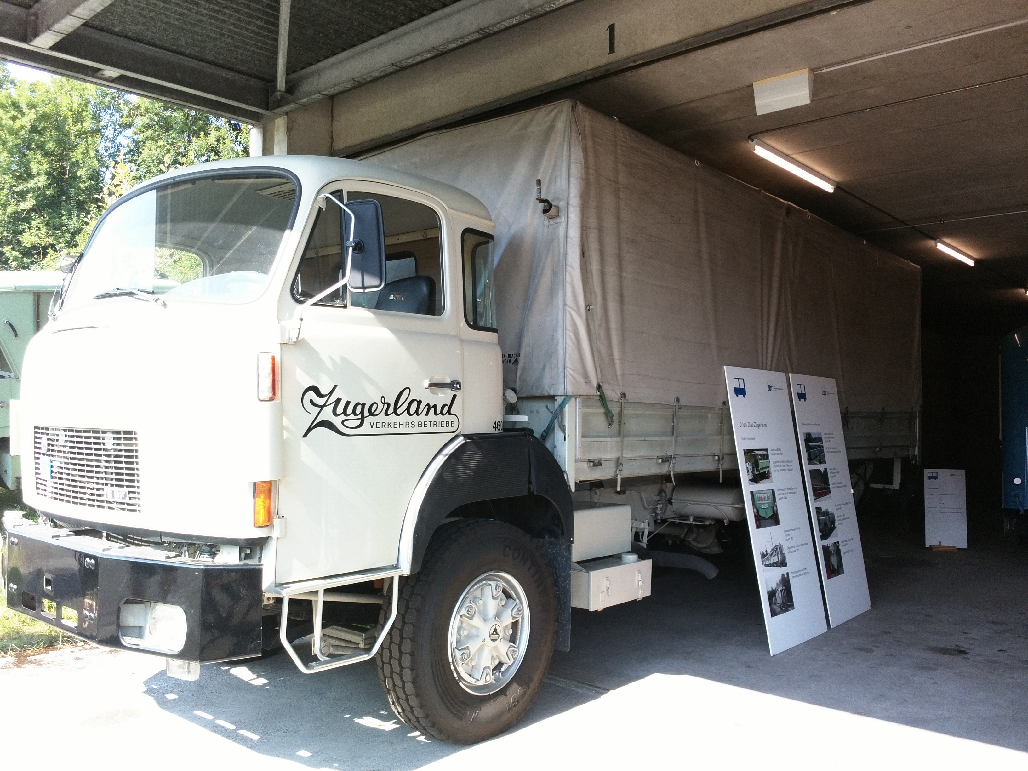 Saurer 5DF Seite